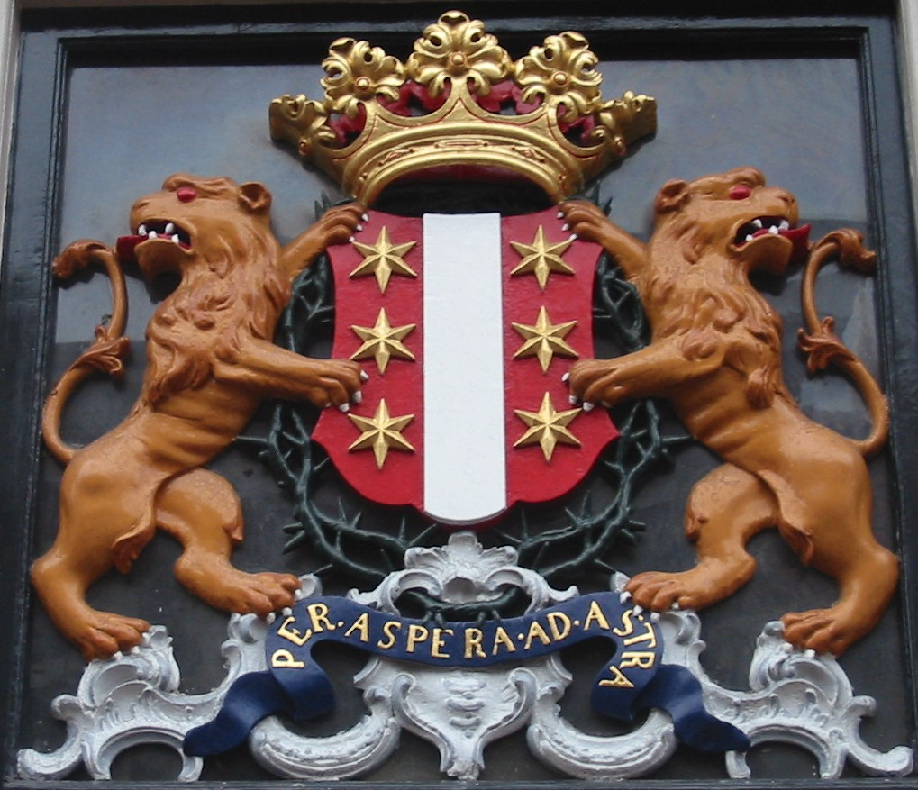 Wapen van Gouda zoals daar zichtbaar op de Lange Tiendeweg